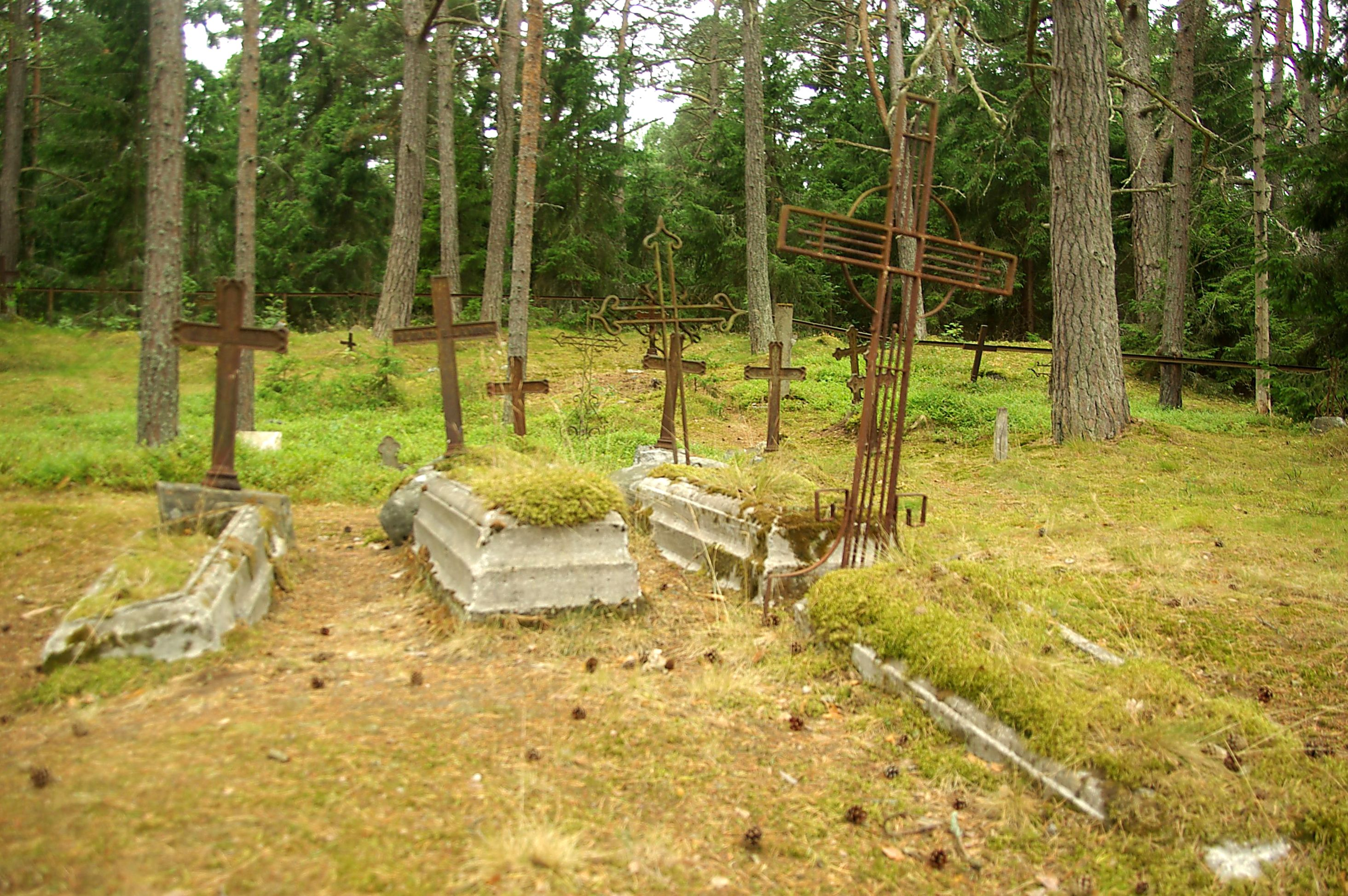 Harju maakond, Tallinna linn, Kesklinna linnaosa Aegna saar